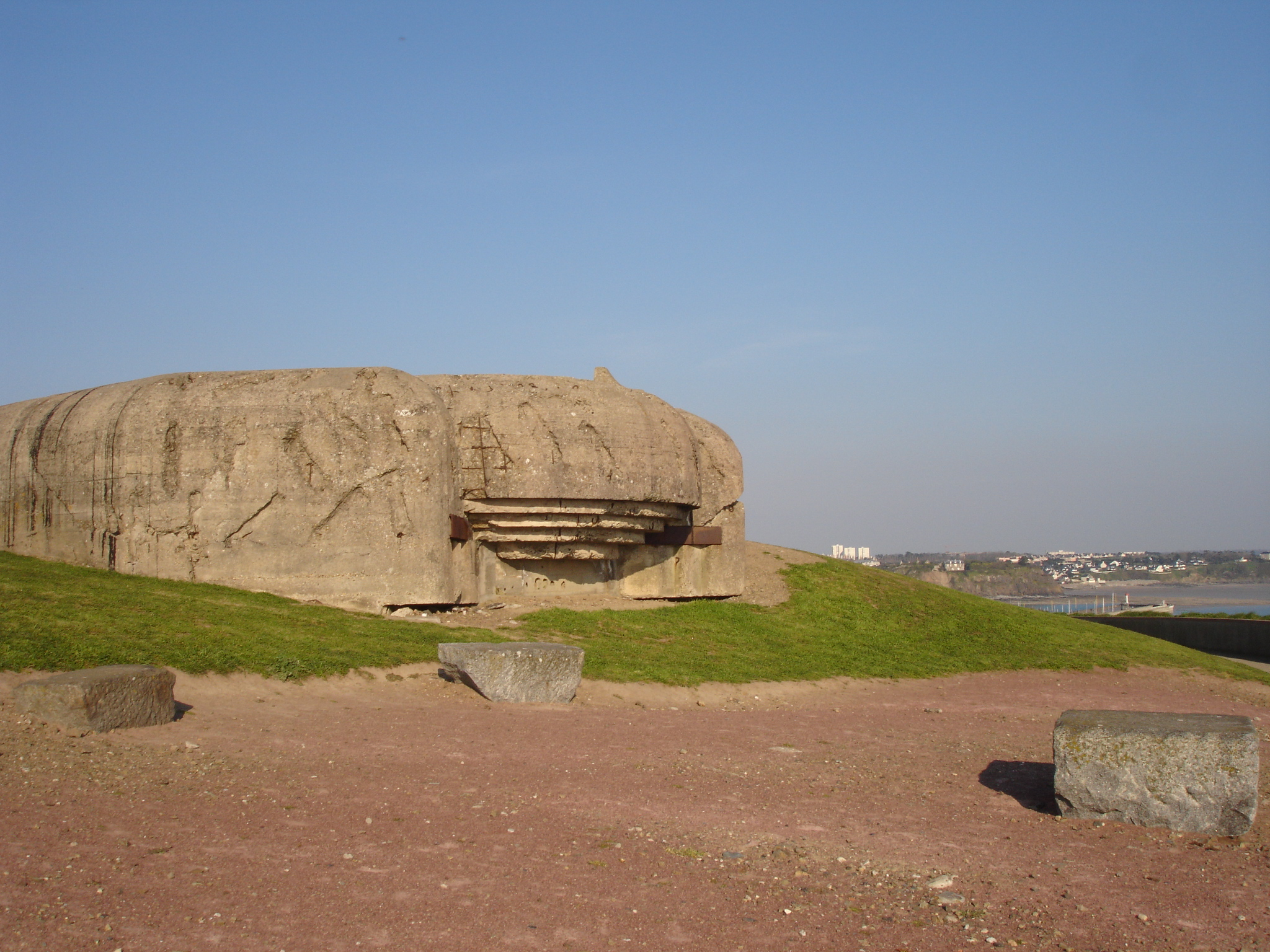 France, Manche (50), Granville, Bunker